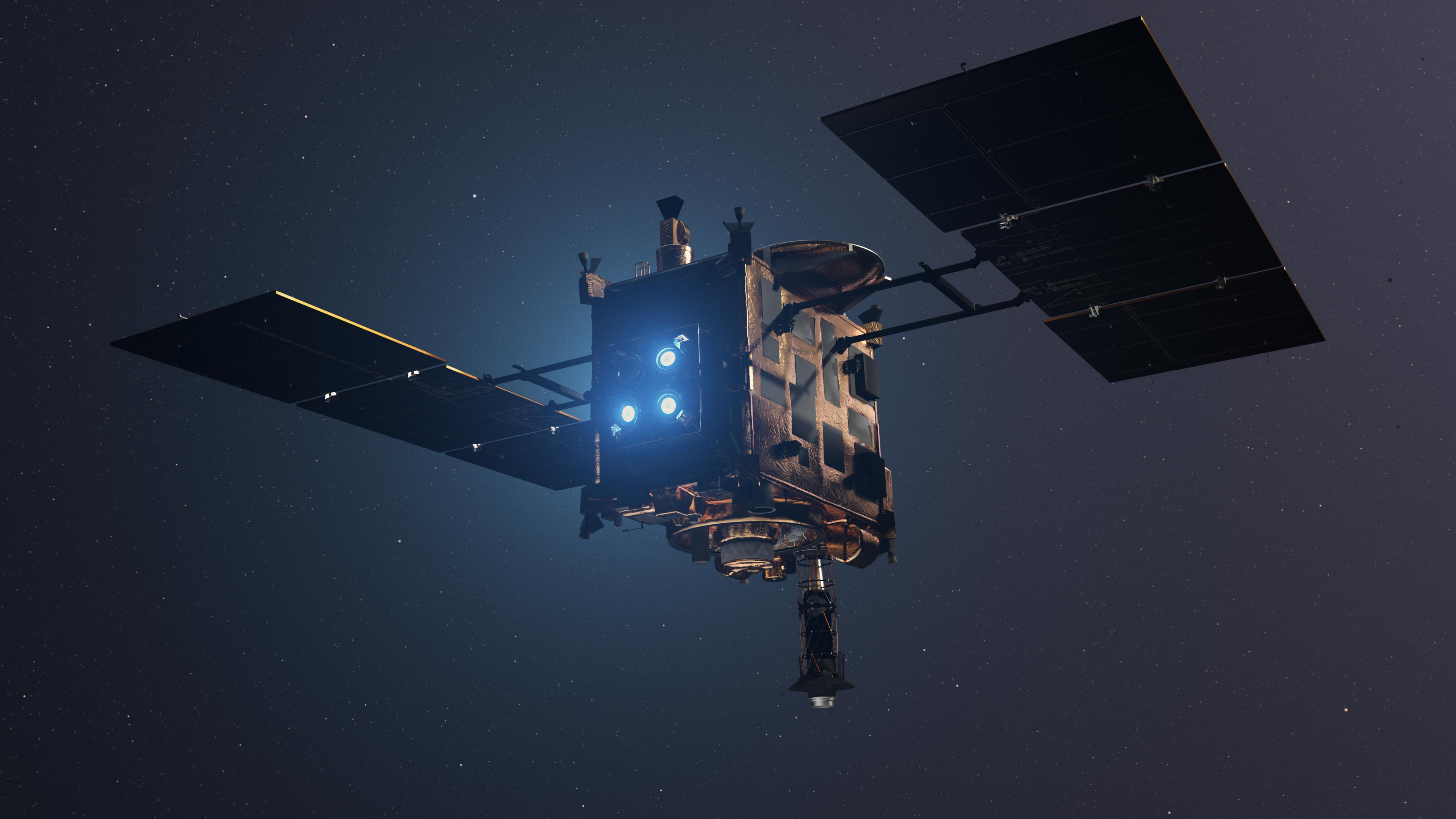 Der effiziente Ionenantrieb dient dem Wechsel der Umlaufbahnen. Eines von vier Triebwerken dient als Backup.